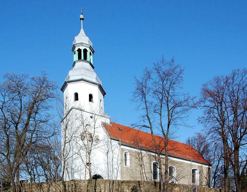 Kościół Najświętszego Serca Pana Jezusa w wałbrzyskiej dzielnicy Poniatów.